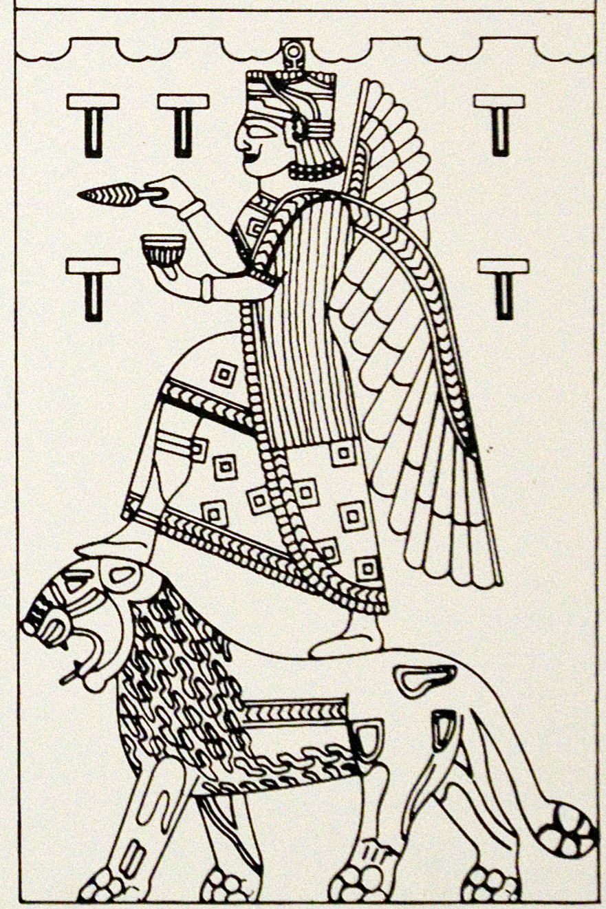 Haldi diety on Rusa Cube